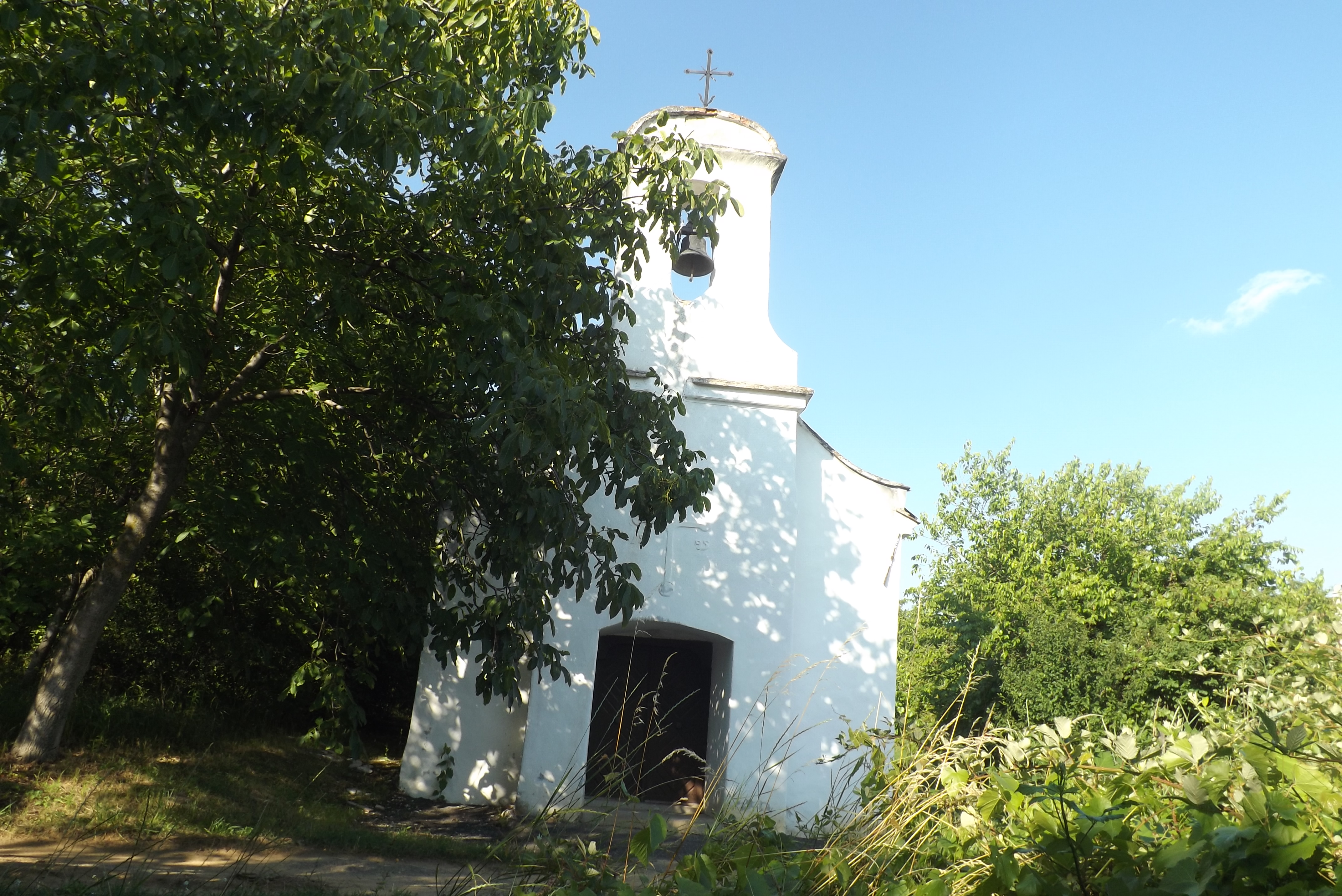 Szent Iván-kápolna, Ábrahámhegy